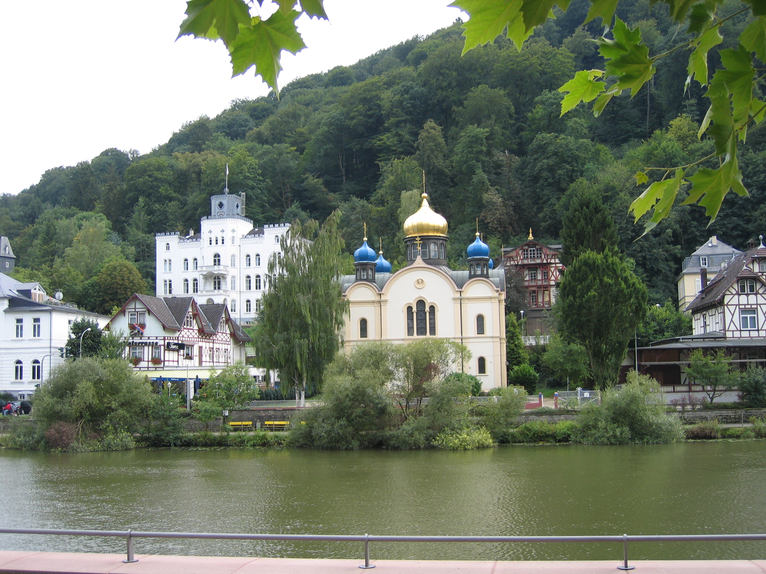 Bad Ems, Russisch-Orthodoxe Kirche, 1876 eingeweiht